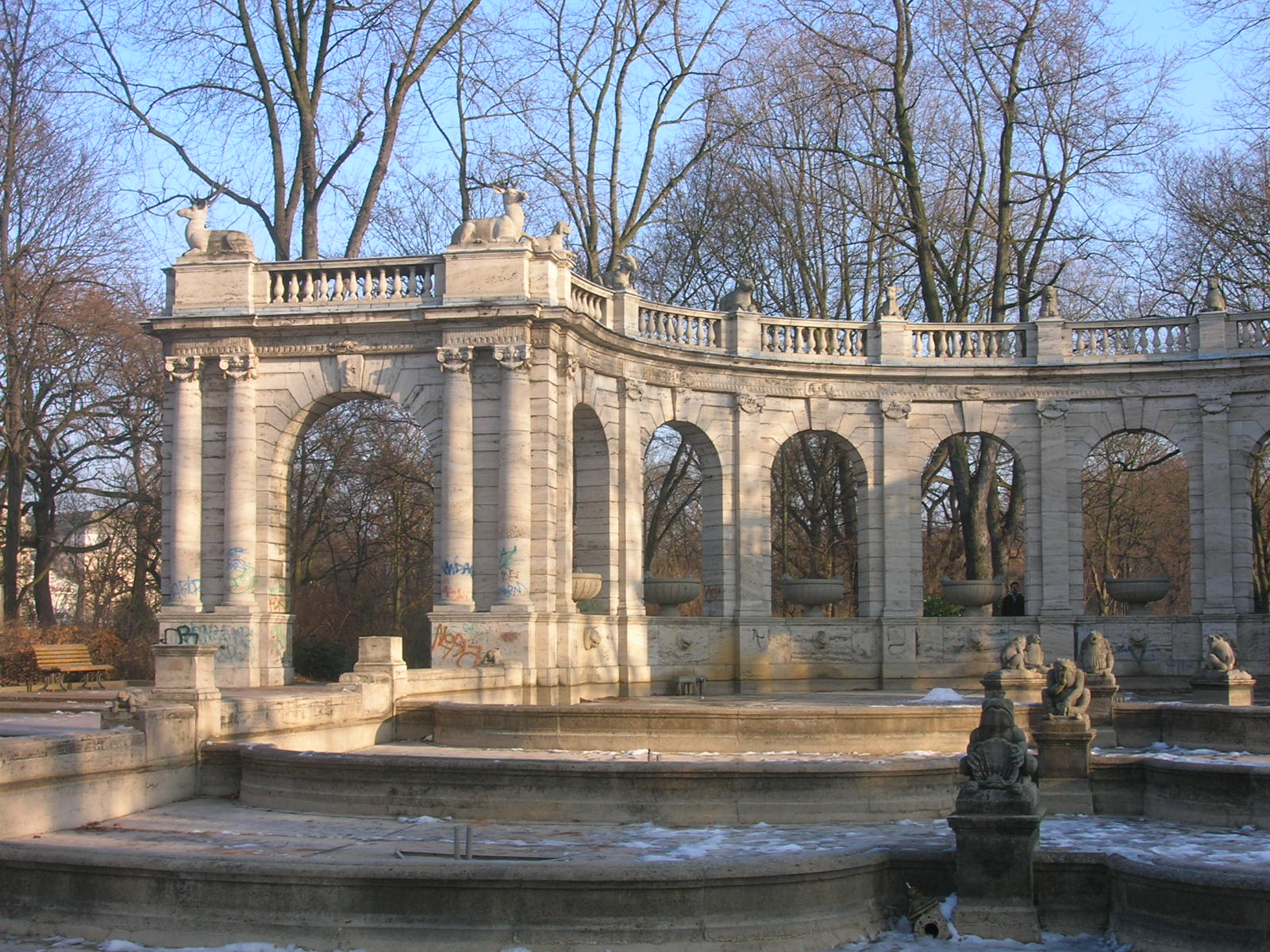 Berlin-Friedrichshain, Märchenbrunnen im Volkspark Friedrichshain. Die Figuren jagdbare Tiere stammen von Josef Rauch taken by Mazbln on January 15, 2006